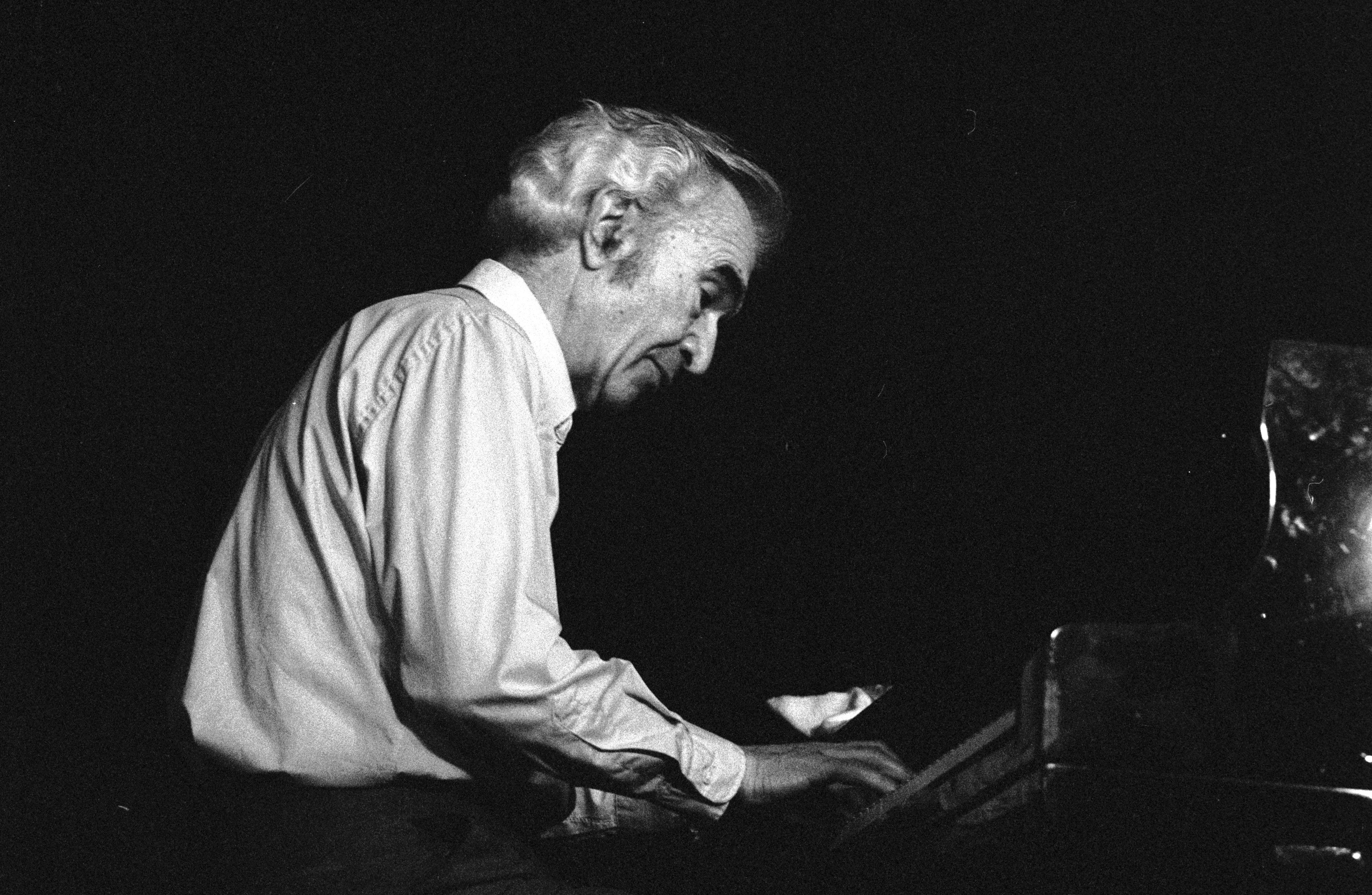 Der US-amerikanische Jazz-Pianist Dave Brubeck 1990 in Deauville (Calvados, Frankreich).